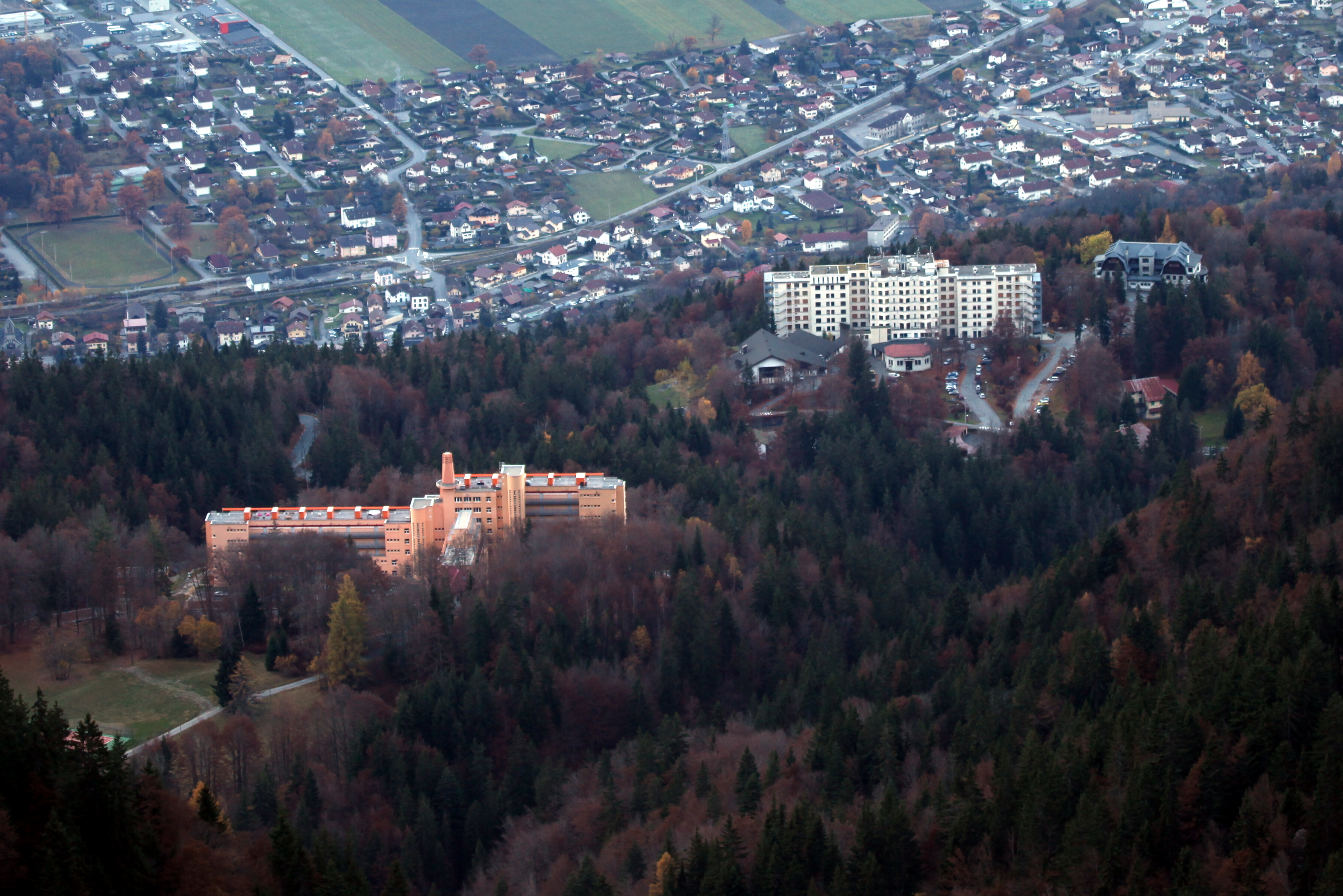 Sanatoriums Martel de Janville et Sancellemoz à Passy.